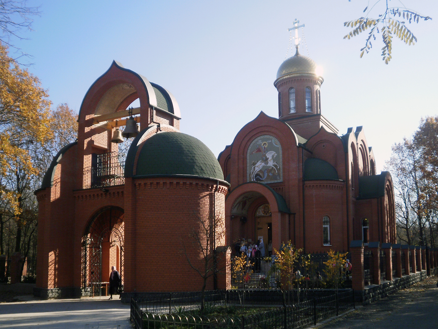 Храм Георгия-Победоносца, расположенный на территории Мемориала 411 батареи в г.Одессе